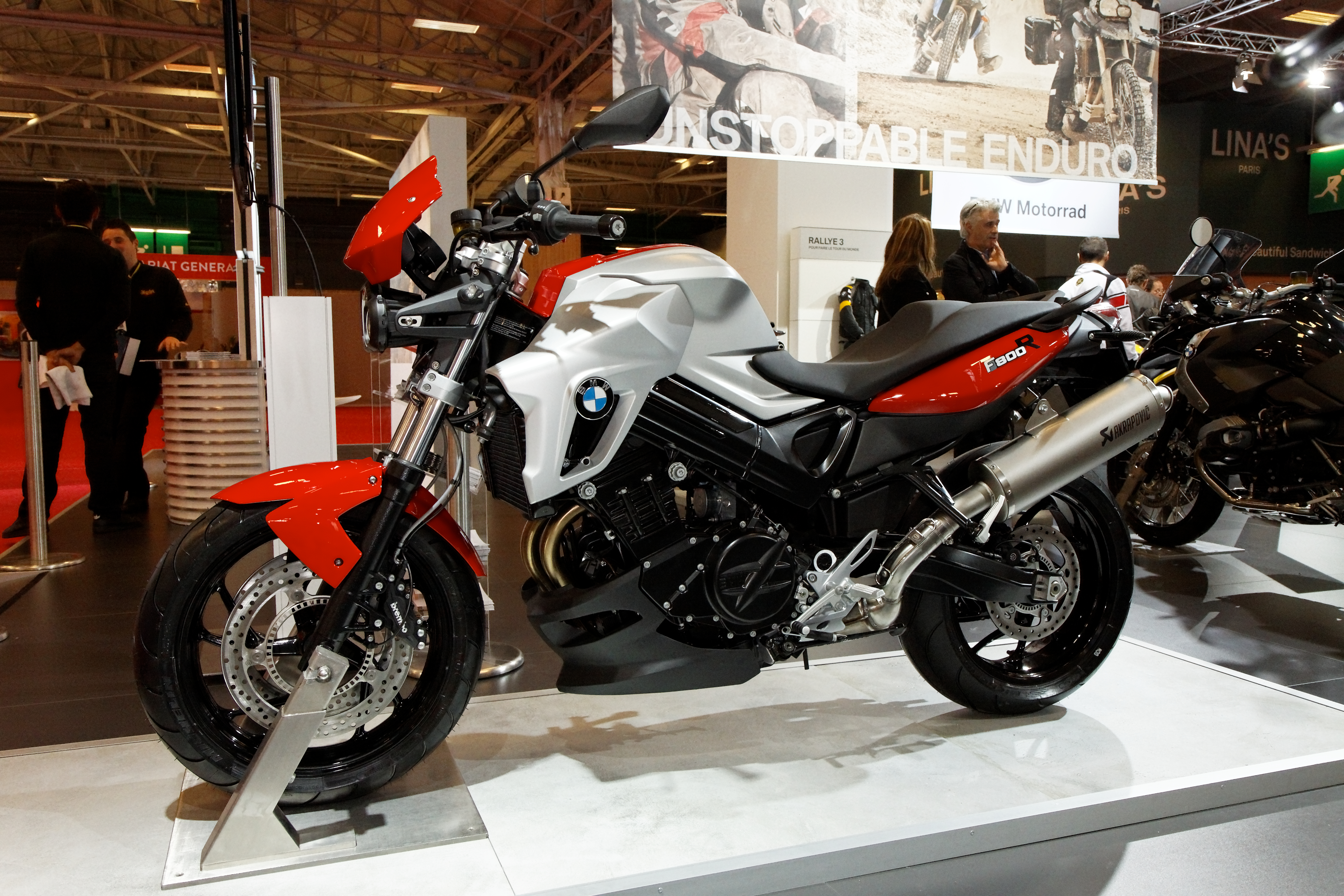 BMW - F 800 R